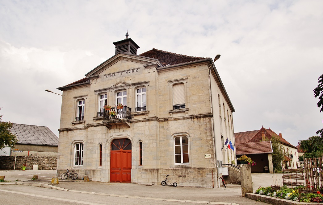 La Mairie